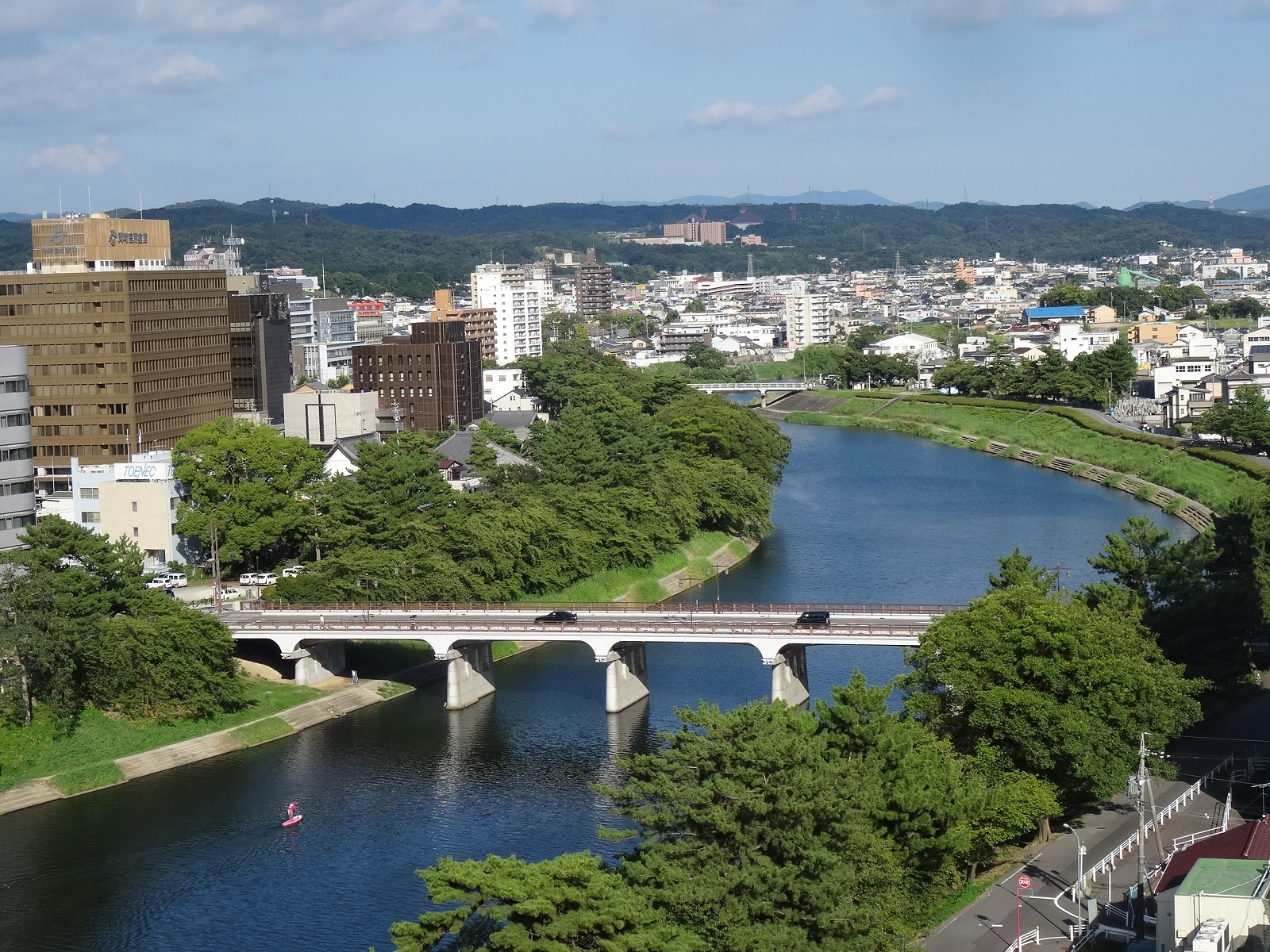 乙川と明代橋